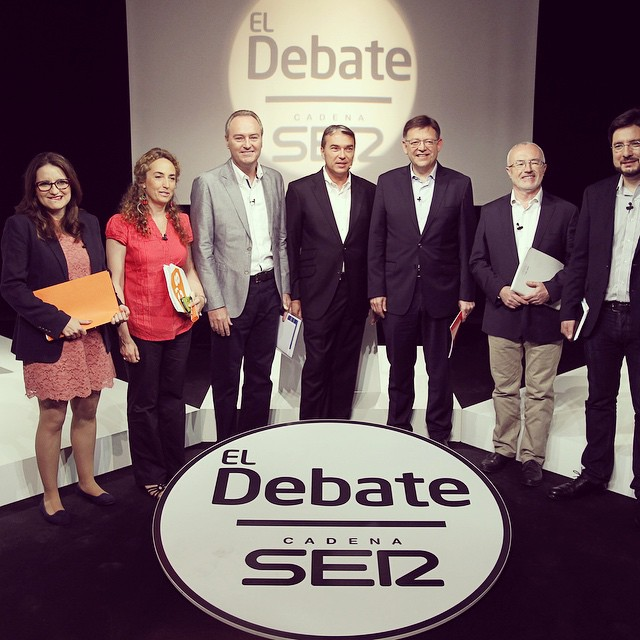 Fabra participa en el debate de la Cadena SER